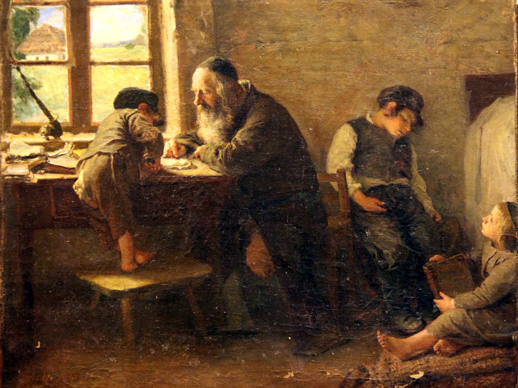 Картина "В хедере" , Леопольд Горовиц, 1878